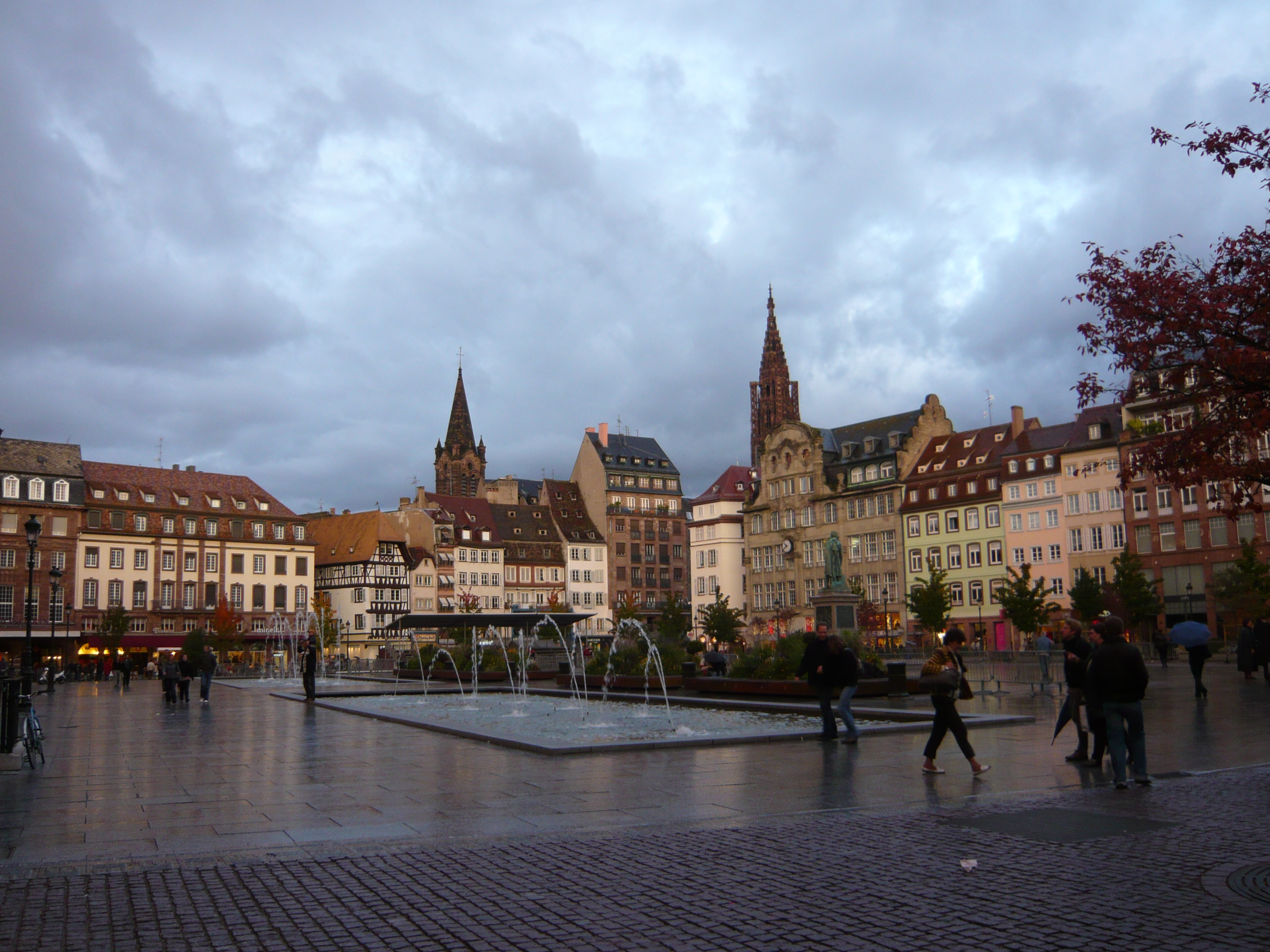 Place kleber